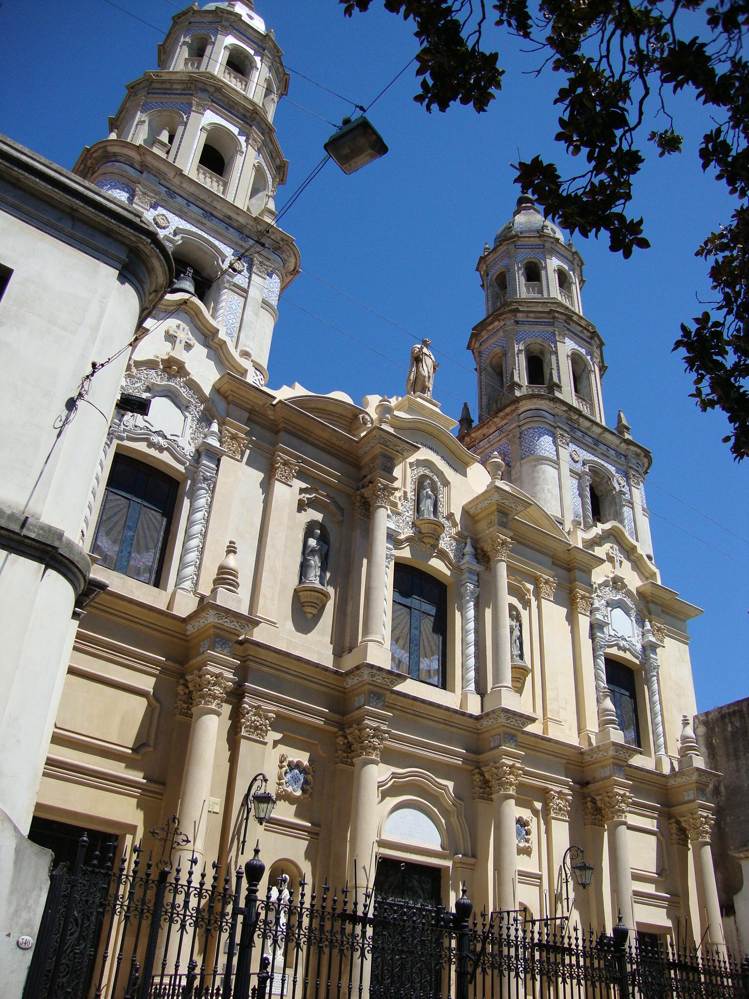 Iglesia de Nuestra Señora de Belén (Parroquia de San Pedro Telmo), antiguo templo católico de la calle Humberto 1º 340, barrio de San Telmo, Buenos Aires, Argentina.